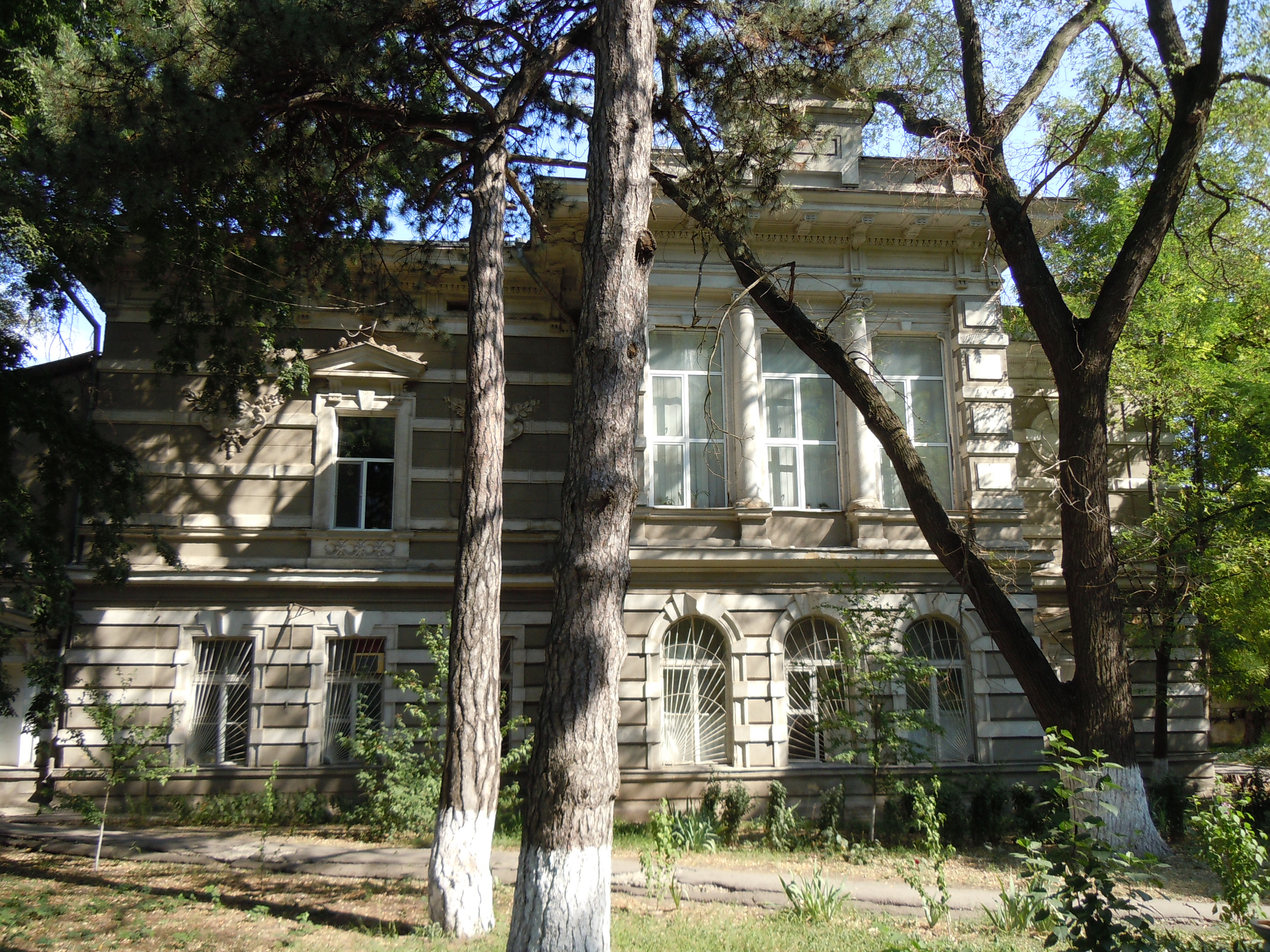 Особняк, Одеса, Куликовський 2-й пров., 4